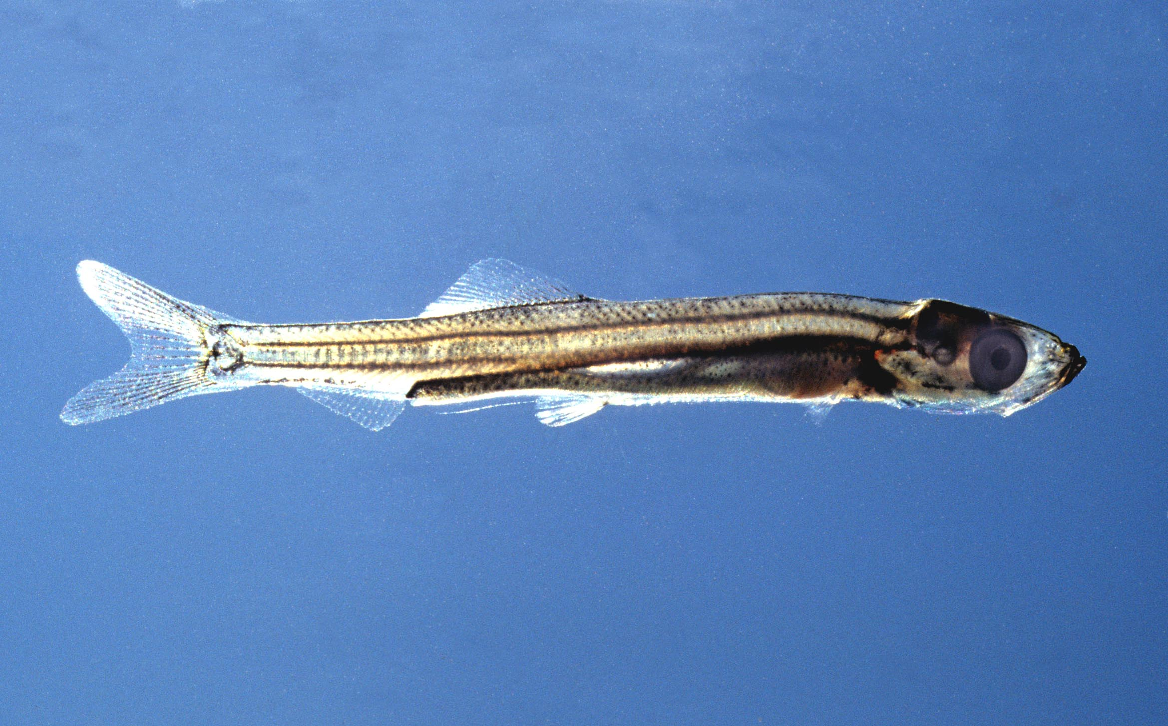 Eine Heringlarve